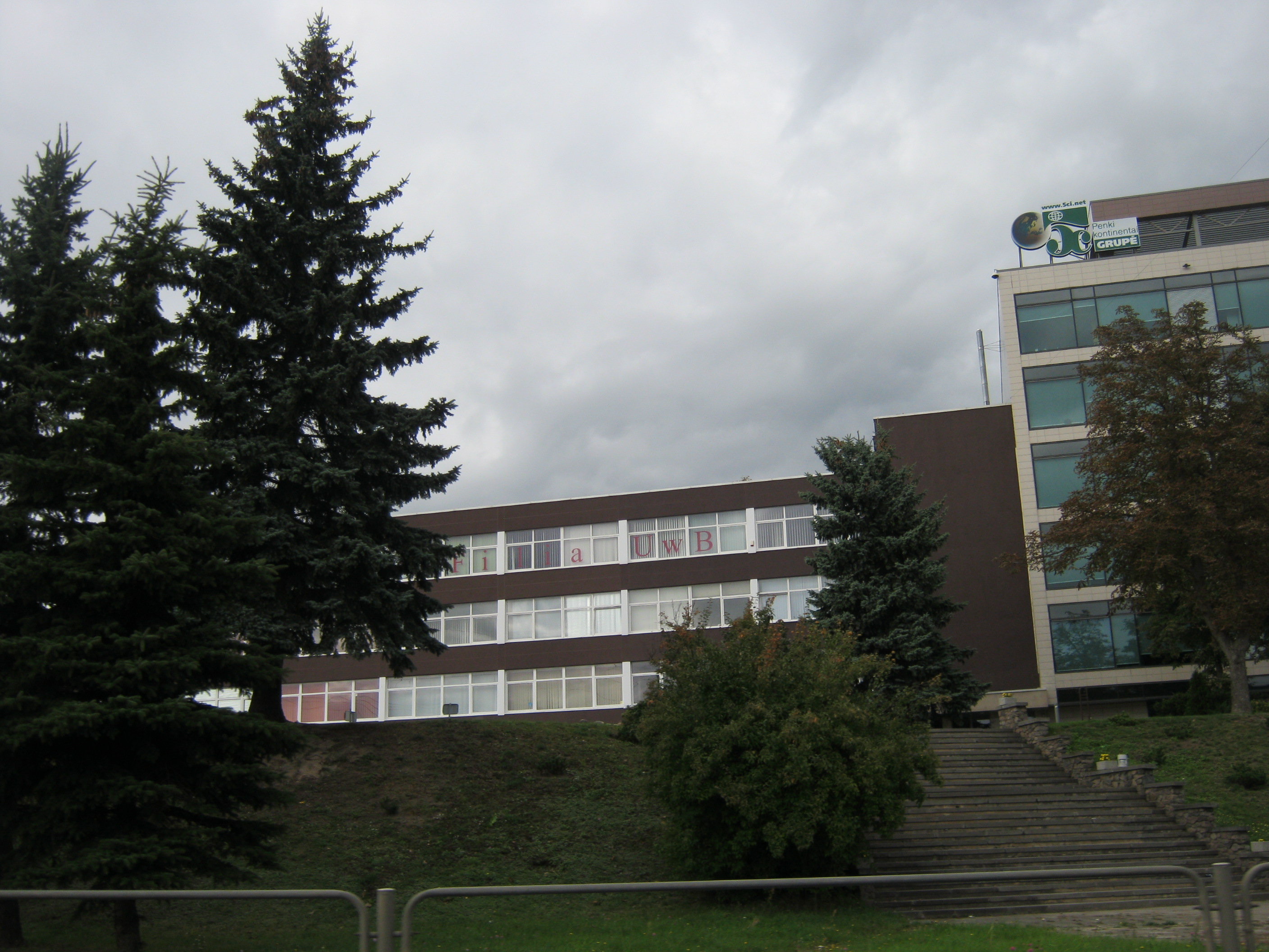 Viasat